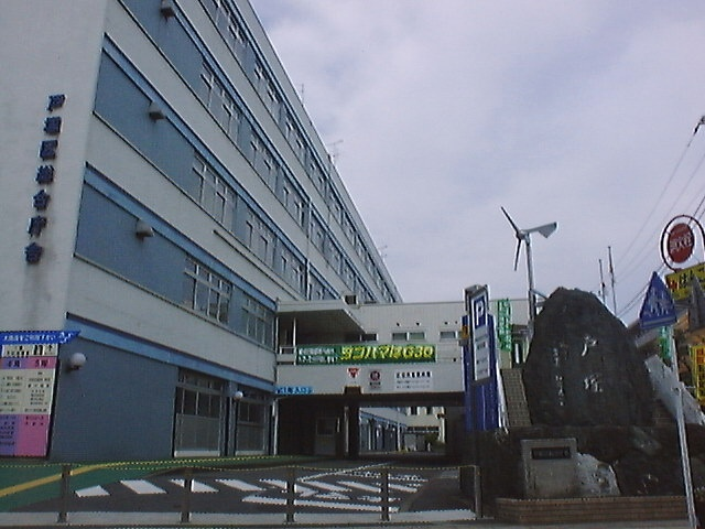 Totsuka-ku Ward Office, Totsuka-ku, Yokohama, Kanagawa, Japan (戸塚区役所)